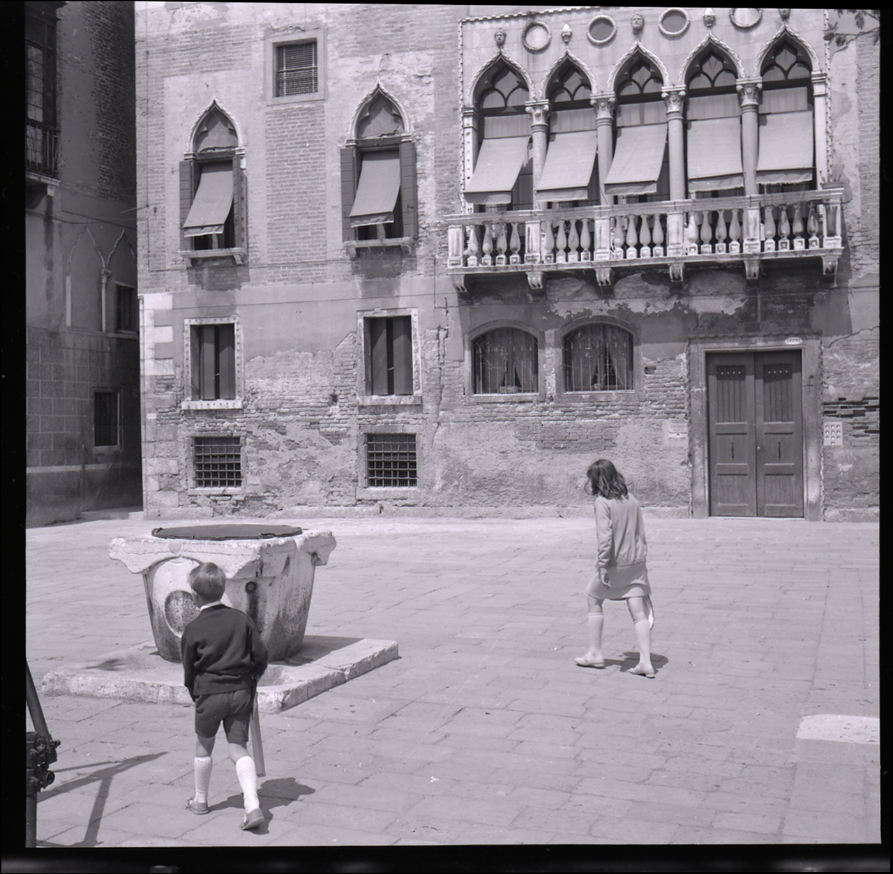 Servizio fotografico : Venezia, 1969 / Paolo Monti. - Buste: 1, Fototipi: 7 : Negativo b/n, gelatina bromuro d'argento/ pellicola ; 6x6. - ((Serie costituita da 1 contenitore portanegativi con 3 strisce di negativi identificabili con i nn.: 19096, 19097, 19098, 19099, 19100, 19101, 19102 (non è però possibile identificarli singolarmente non essendoci scritti i numeri in corrispondenza del singolo negativo). - Occasione: Documentazione per la pubblicazione: Arslan Edoardo, "Venezia gotica: architettura civile gotica veneziana", Milano, Electa, 1970. - Fonte: Monografia di Arslan, Edoardo: Venezia gotica: architettura civile gotica veneziana, Milano, Electa (1970)